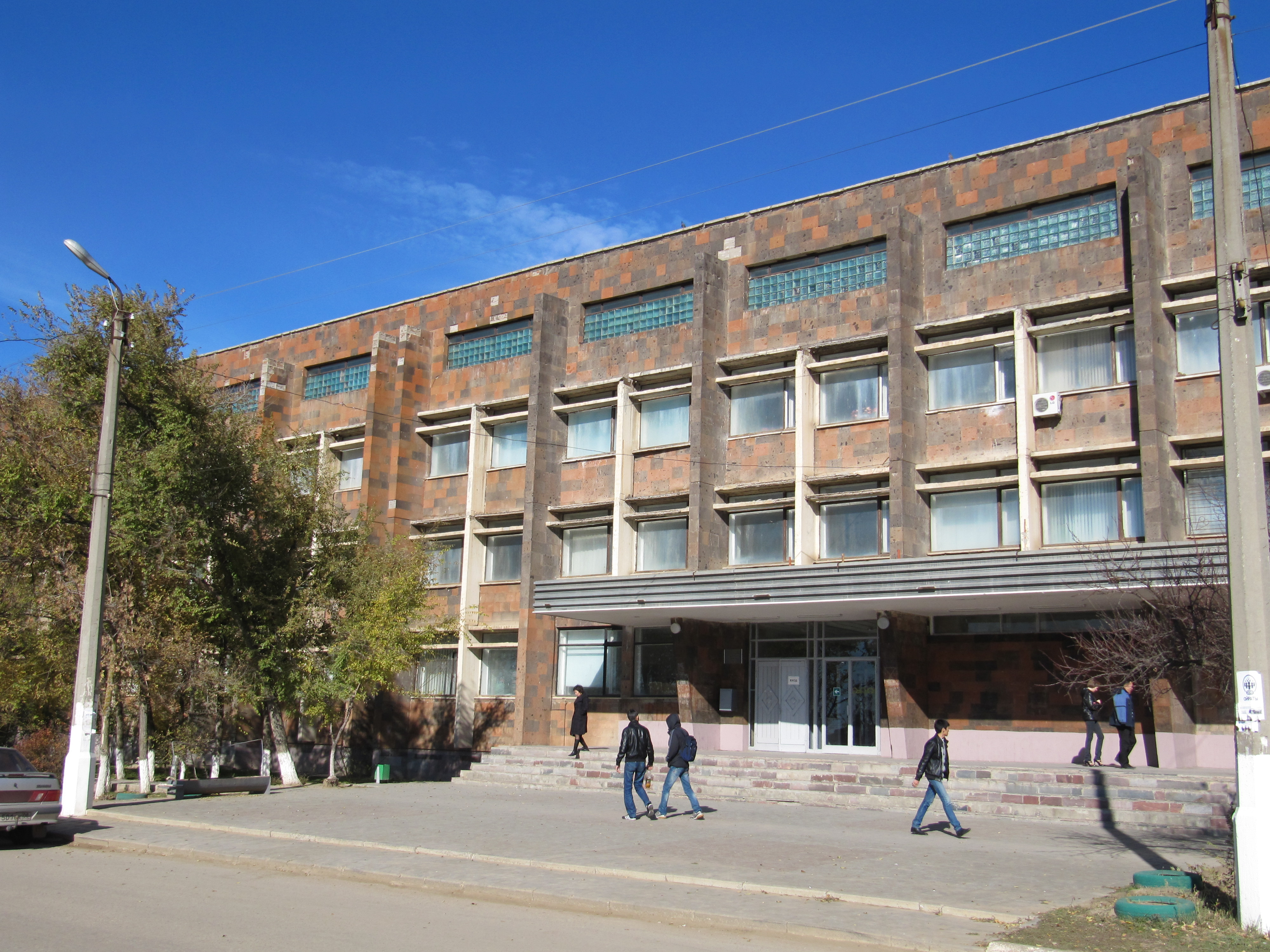 Калмыцкий Государственный университет, Элиста